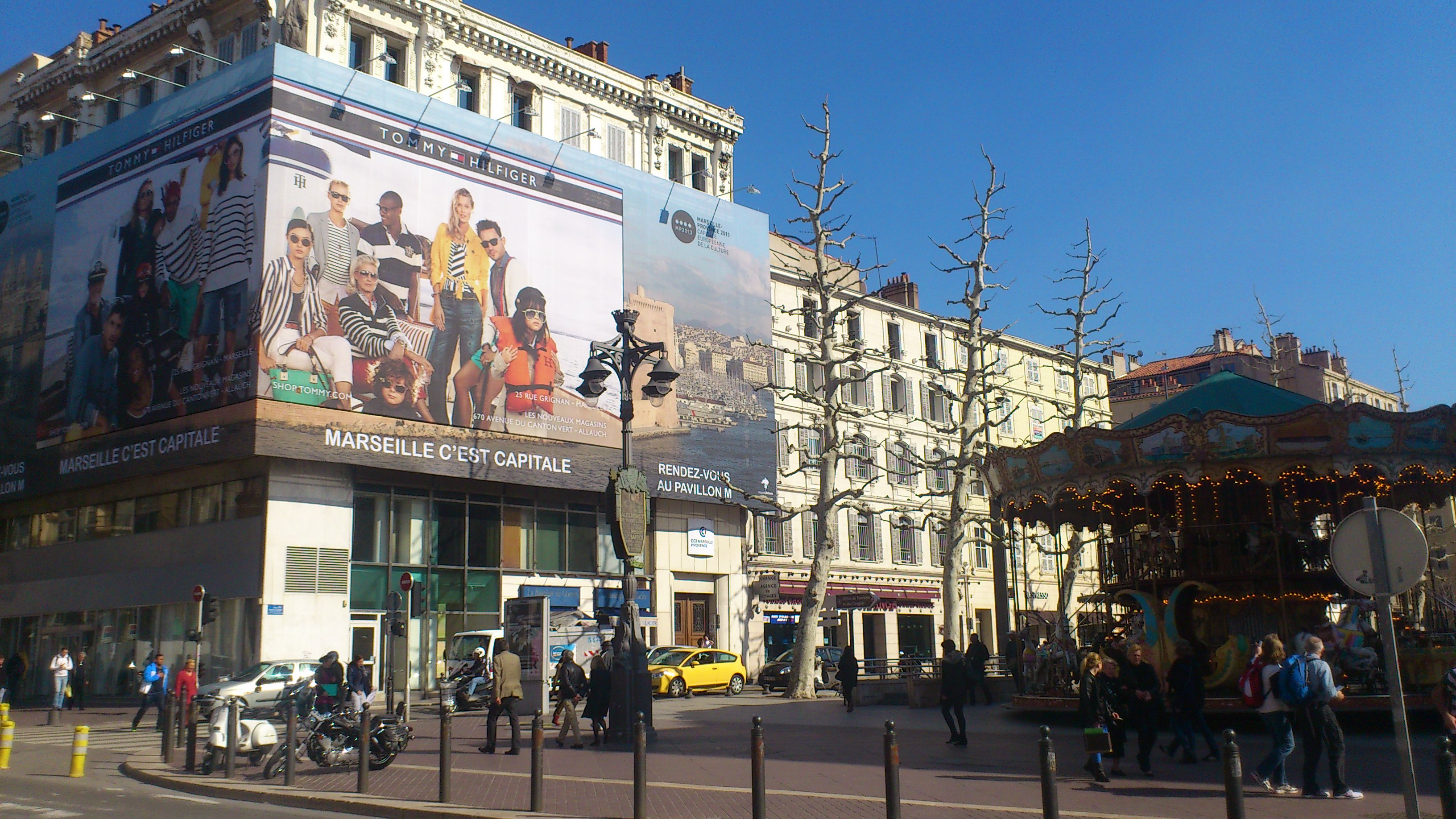 publicité pour Marseille Provence 2013 sur un immeuble de la canebière à côté du caroussel, Mars 2013